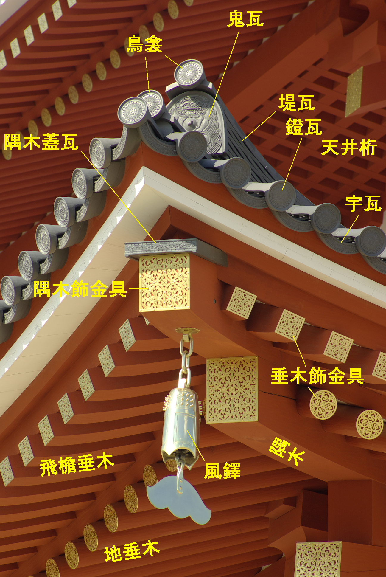 復元された平城宮大極殿にみる屋根の各構成部品。図中の各部の名称は、前場幸治『古瓦考（相模国分寺千代台廃寺）』冬青社(1993年)溝口明則『法隆寺建築の設計技術』鹿島出版会（2012年）による。